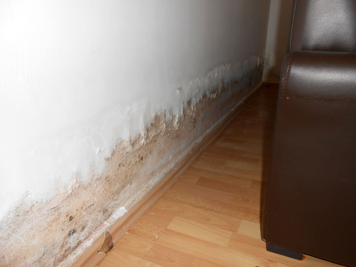 Kondensatbildung und Schimmelpilzbefall im Bereich einer Wärmebrücke